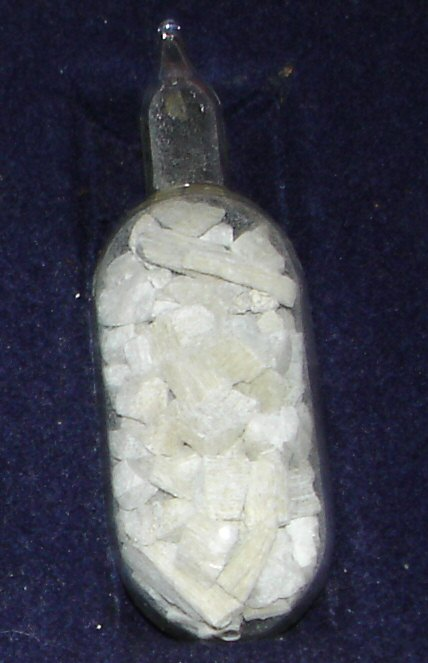 Die Chemikalie Ceritchlorid wasserfrei (Certrichlorid?)